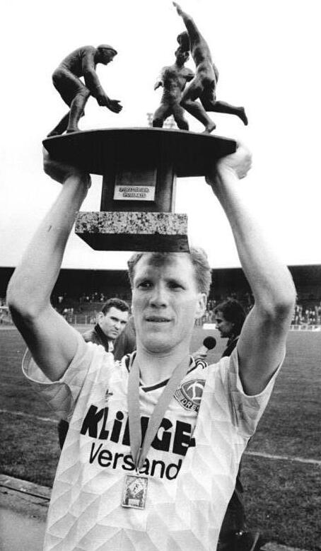 ADN-Settnik-2.6.90-Berlin: Fußball-Pokalfinale 1. FC Dynamo Dresden - PSV Schwerin 2:1 Matthias Sammer, der in Kürze für den VfB Stuttgart kicken wird, nach seinem letzten Spiel bei Dynamo Dresden. Der DDR-Meister konnte sich vor 5.700 Zuschauern im Jahn-Sportpark gegen die stark aufspielenden Schweriner mit 2:1 durchsetzen und holte sich damit den Pokal zum siebenten Mal.